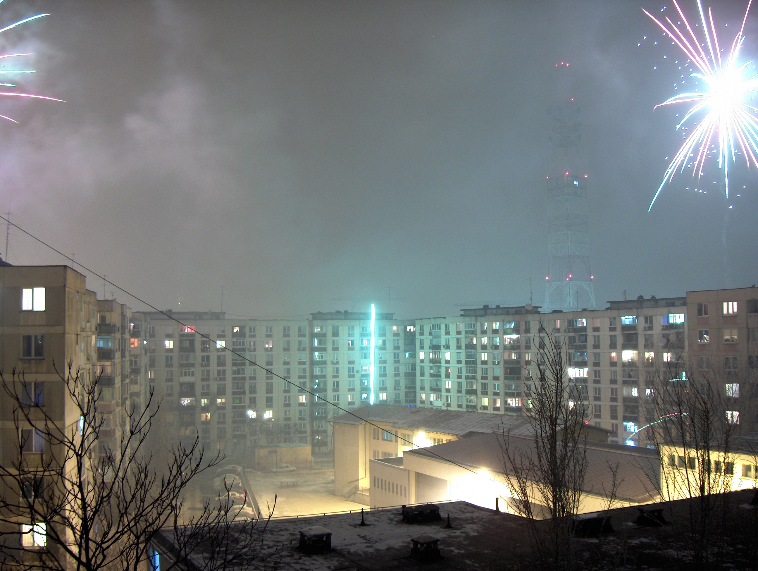 Berceni intre blocuri